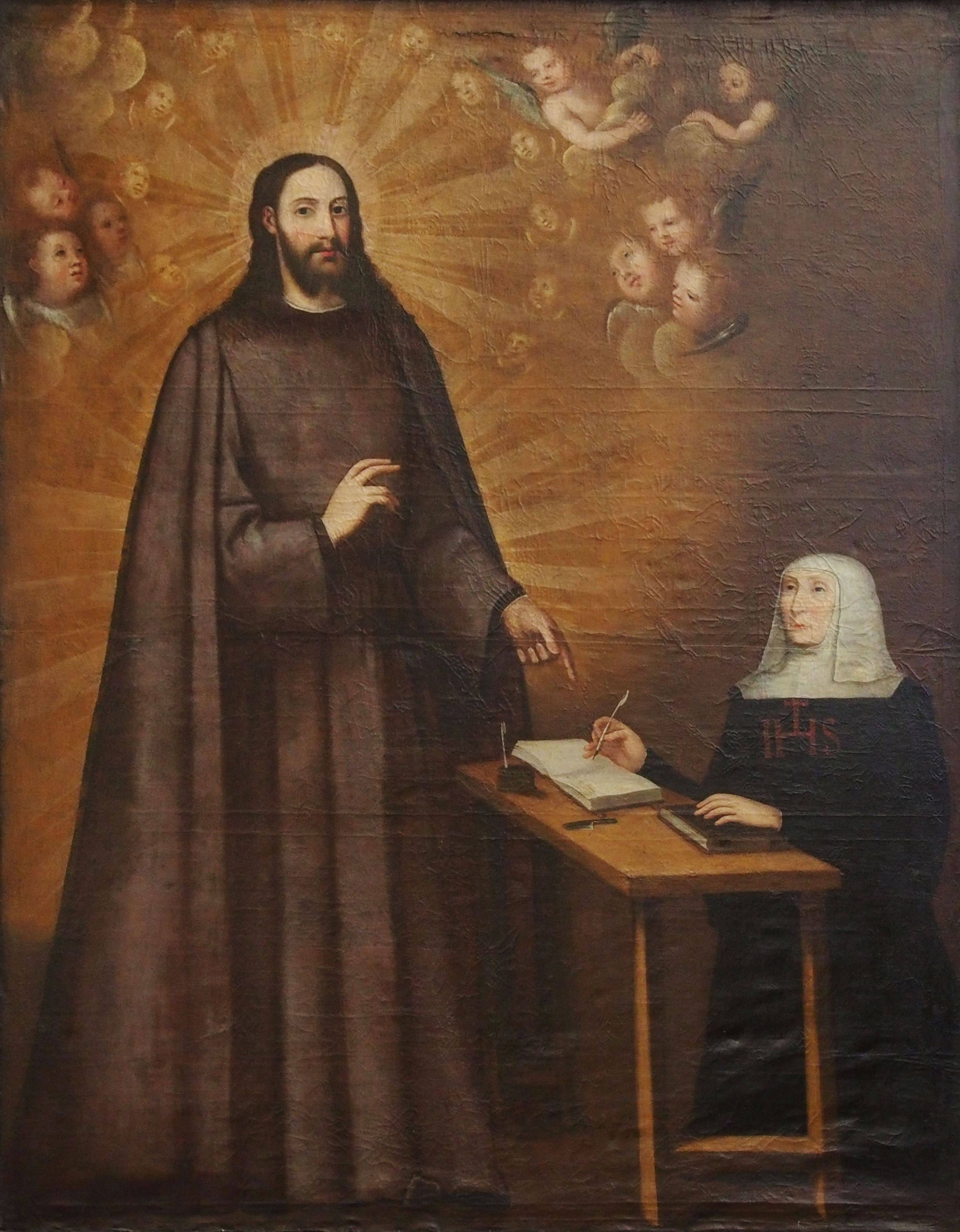 Visión de Cristo como jesuita por la venerable Marina de Escobar. Pintura de Diego Valentín Díaz. Iglesia de San Miguel y San Julián (Valladolid).